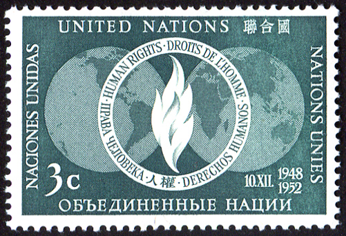 Беларуская (тарашкевіца): Паштовая марка ААН «Правы чалавека»